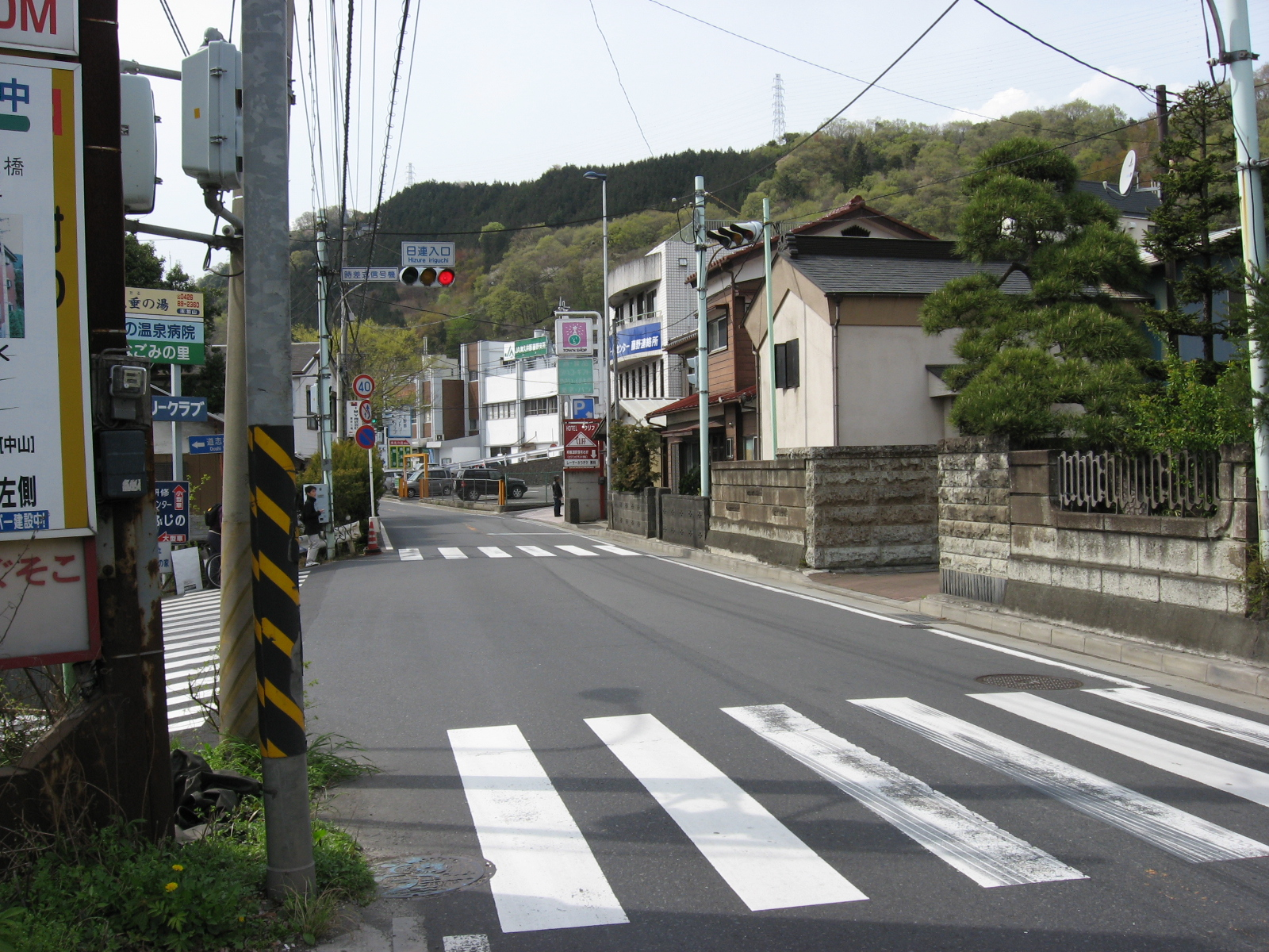 国道20号線、「日連大橋入口」交差点